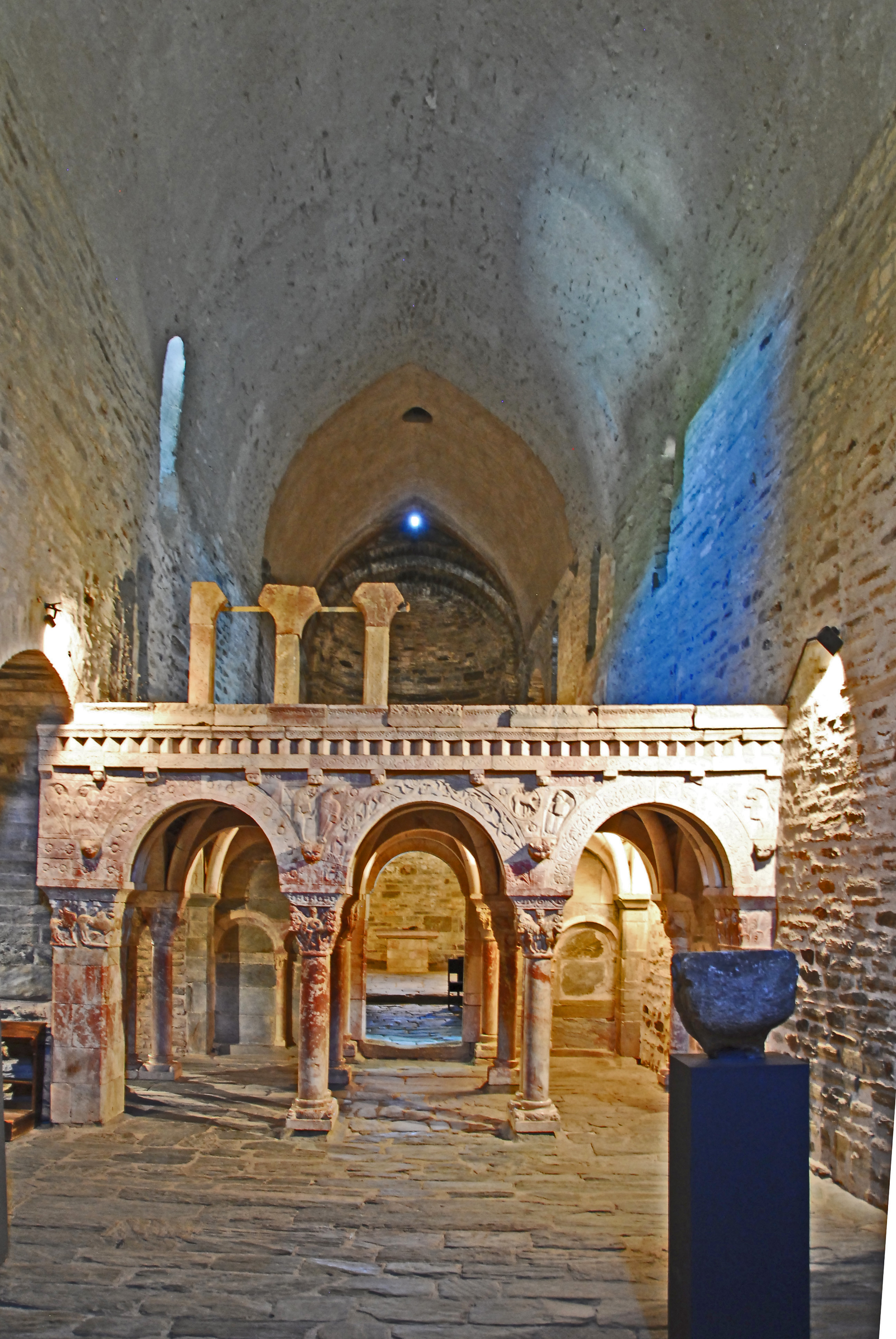 Serrabone, Empore, Westfassade